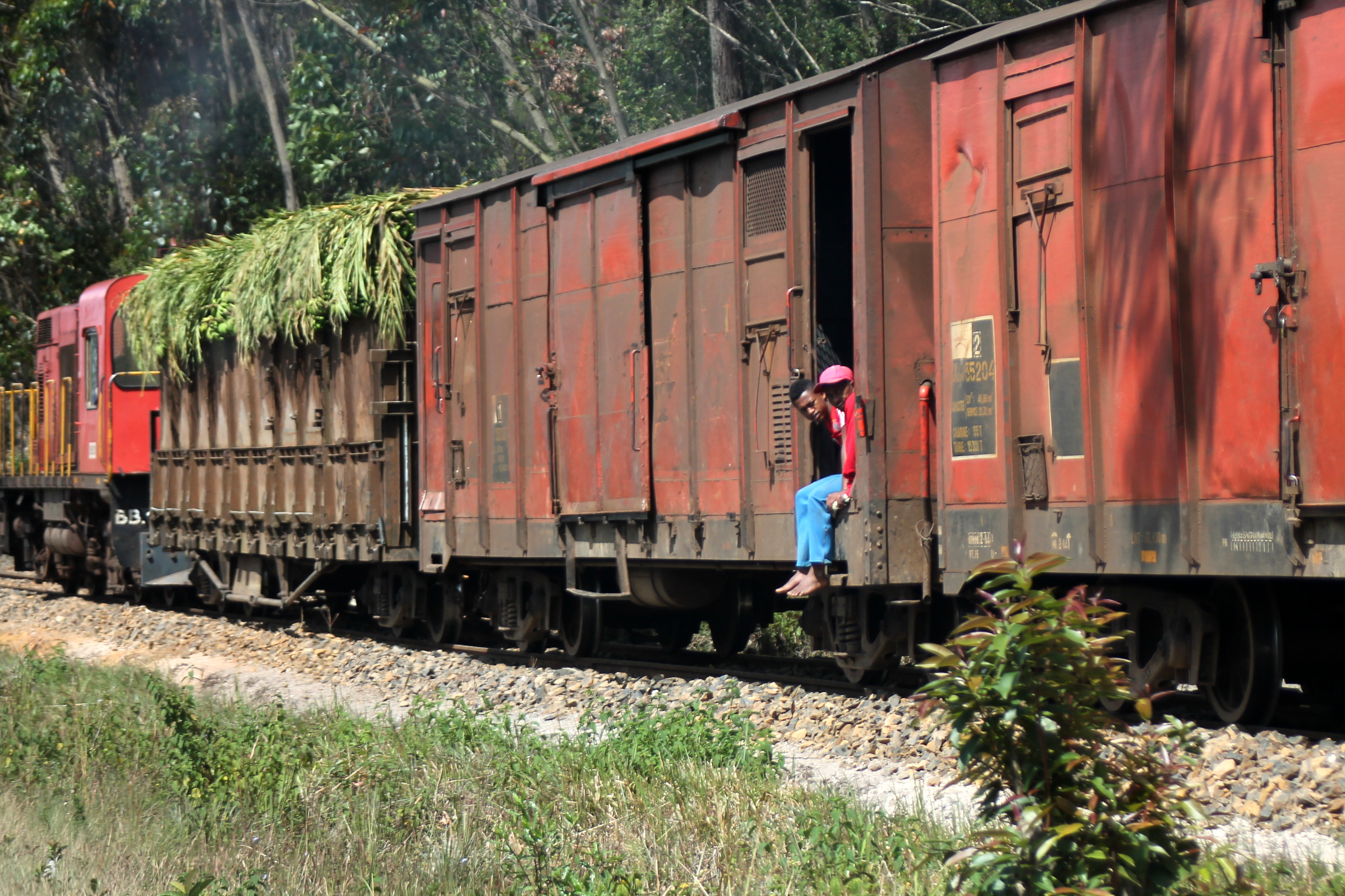 Trein in Andasibe